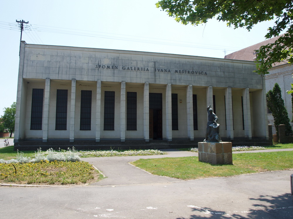 Spomen galerija Ivana Meštrovića u Vrpolju, Brodsko-posavska županija.